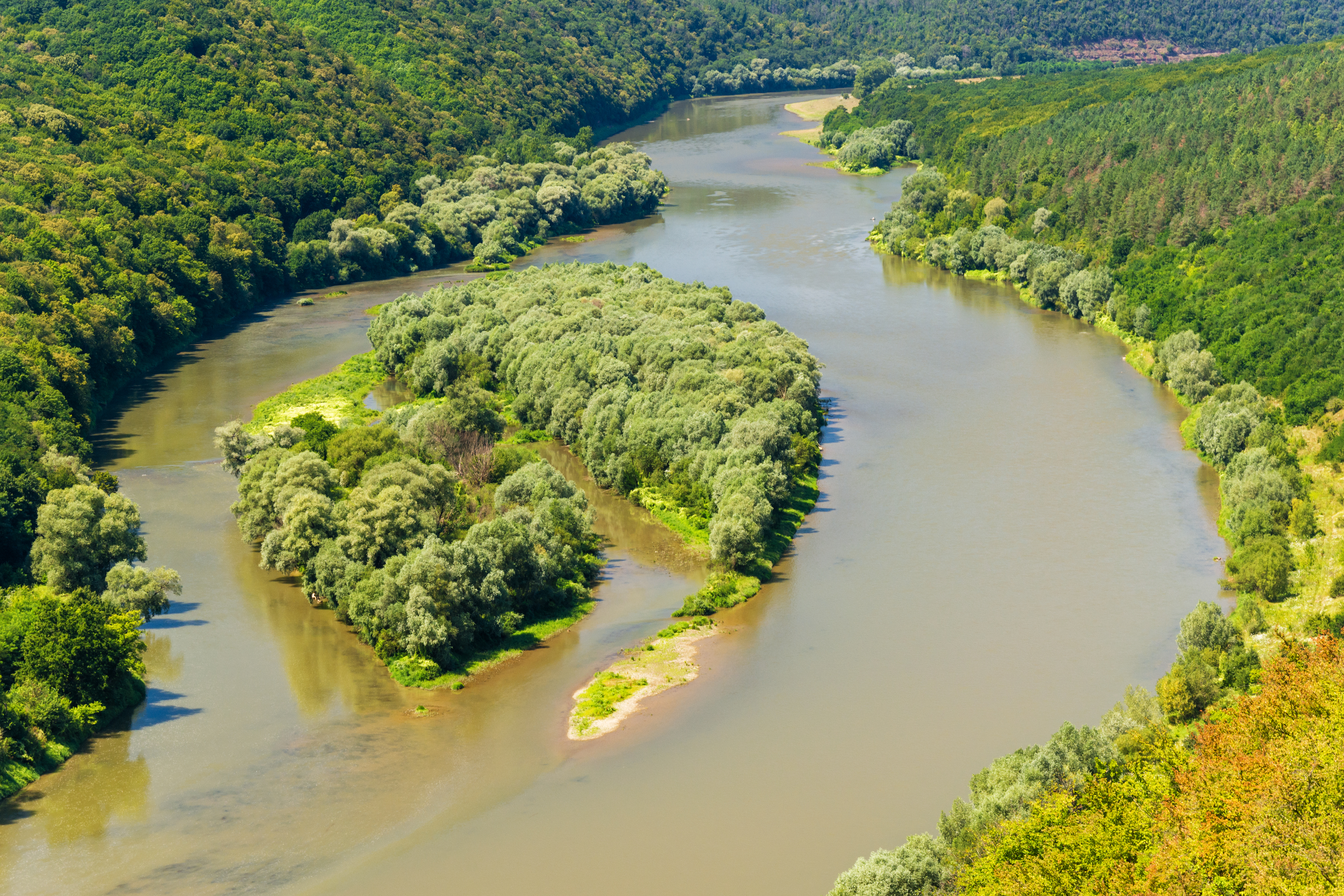 «Дністровський каньйон» поблизу с. Литяч Заліщицького району Тернопільської области.